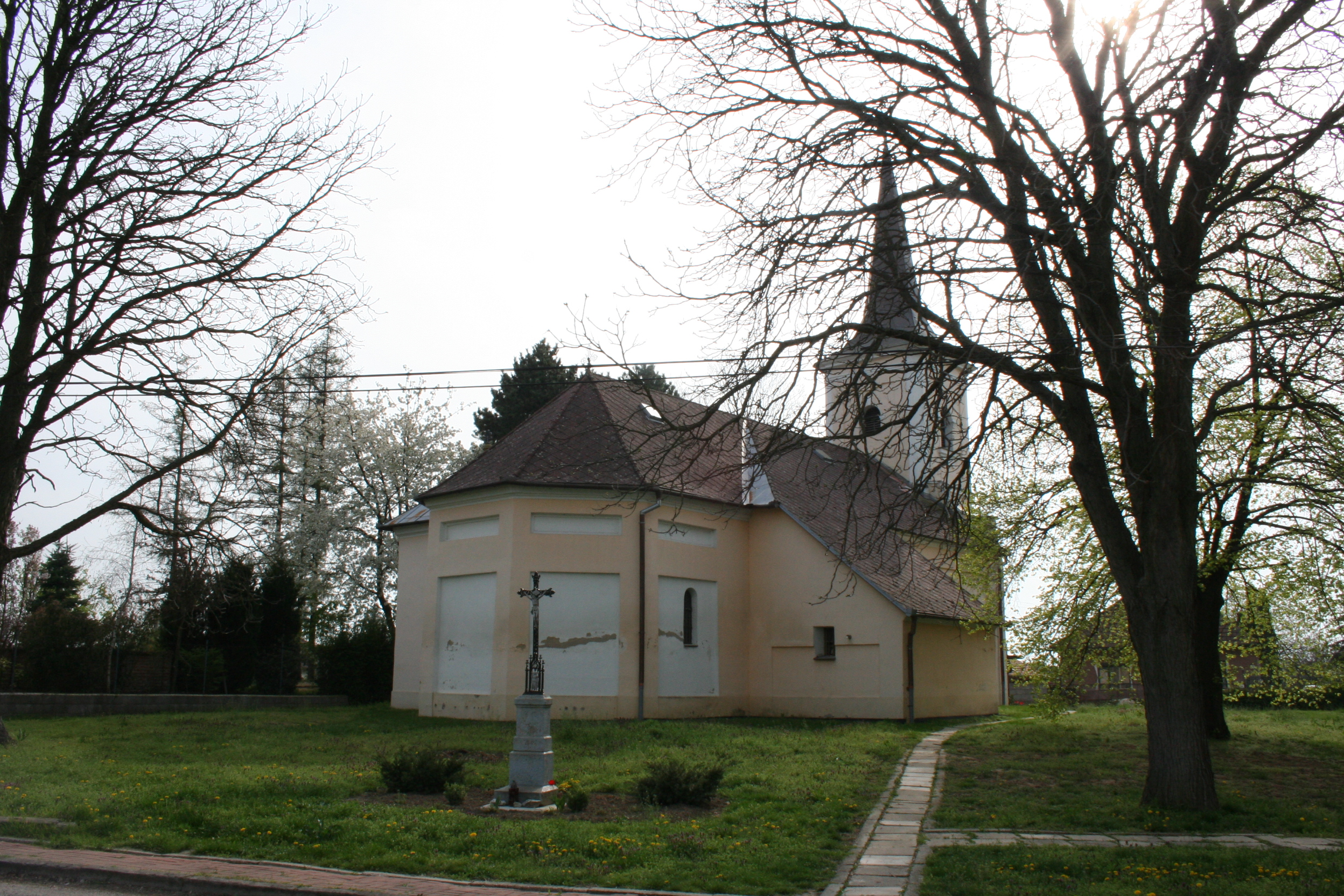 Zsitvagyarmat